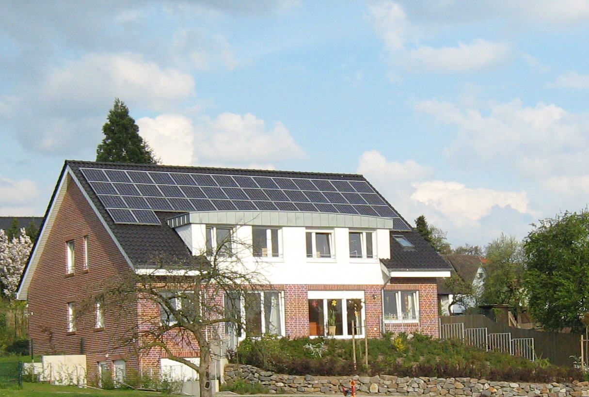 Haus 1 der Don Bosco Kath. Jugendhilfe in Osnabrück